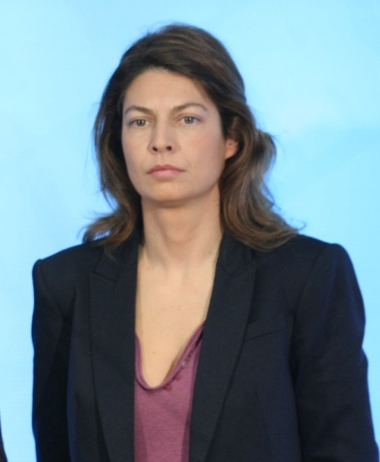 Lucía Figar en enero de 2011